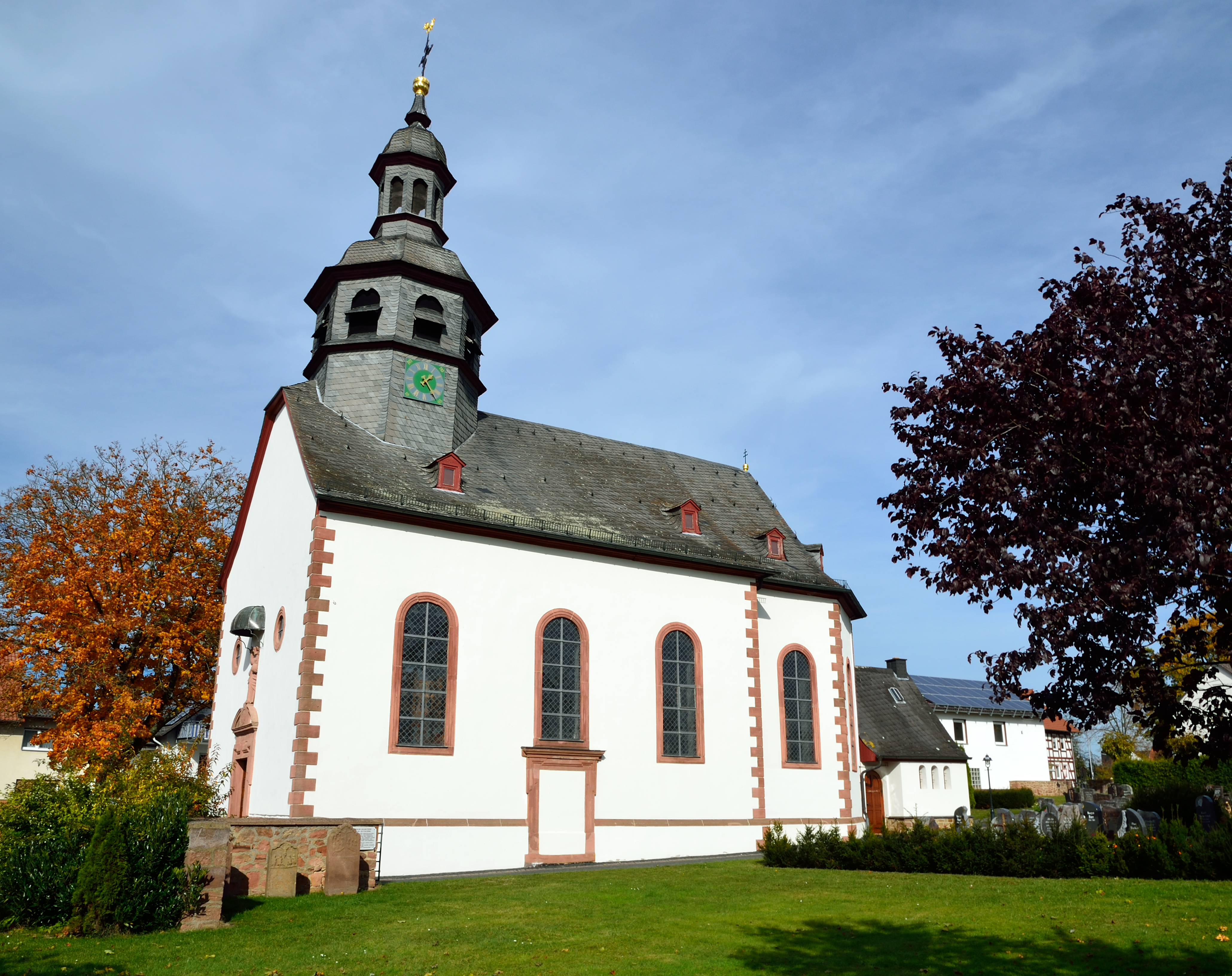 Katholische Pfarrkirche "St.-Antonius-der-Einsiedler" in Rüdigheim (Amöneburg)